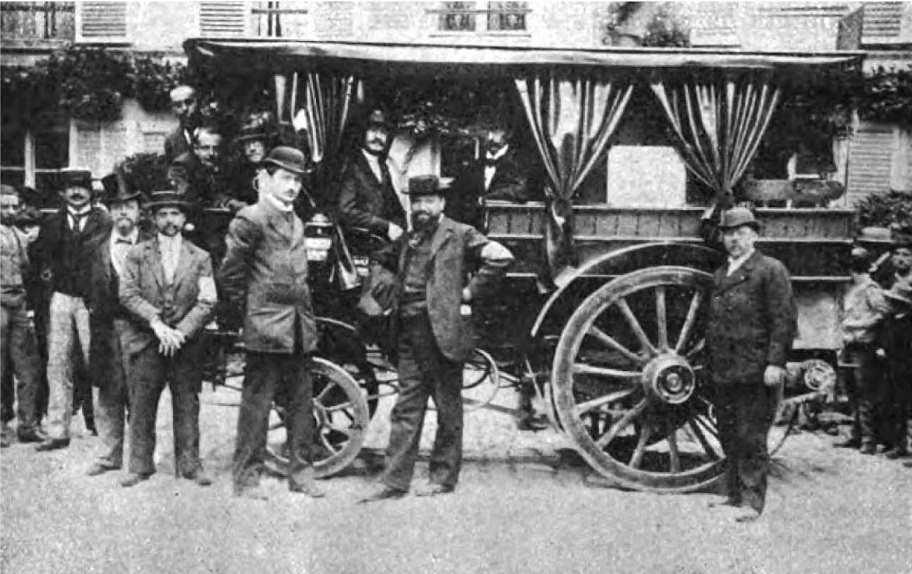 Breack à neuf places de Maurice Le Blant (Paris-Rouen 1894)